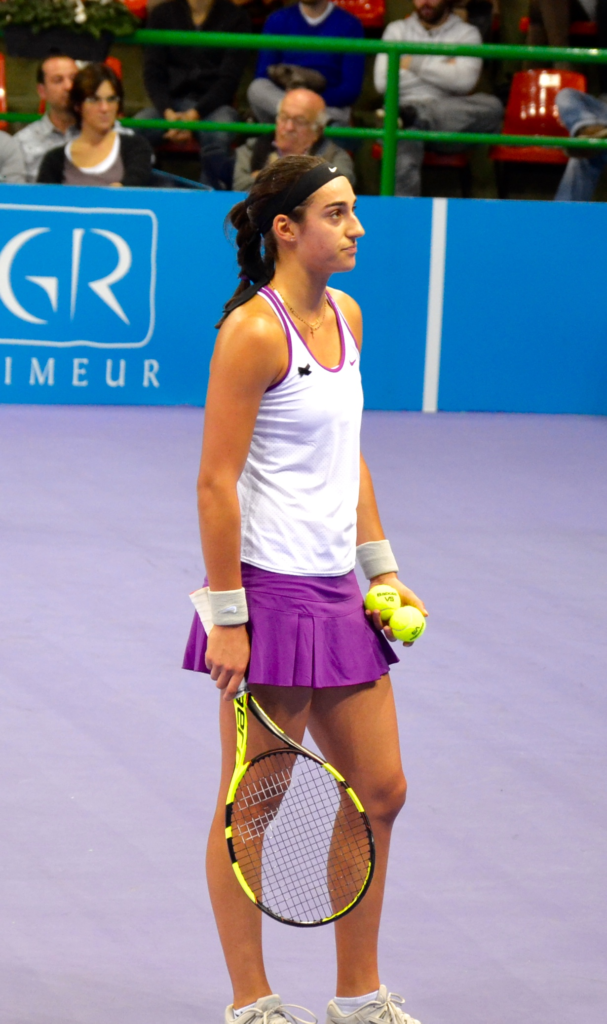 Caroline Garcia en finale du tournoi de tennis de Limoges 2015.